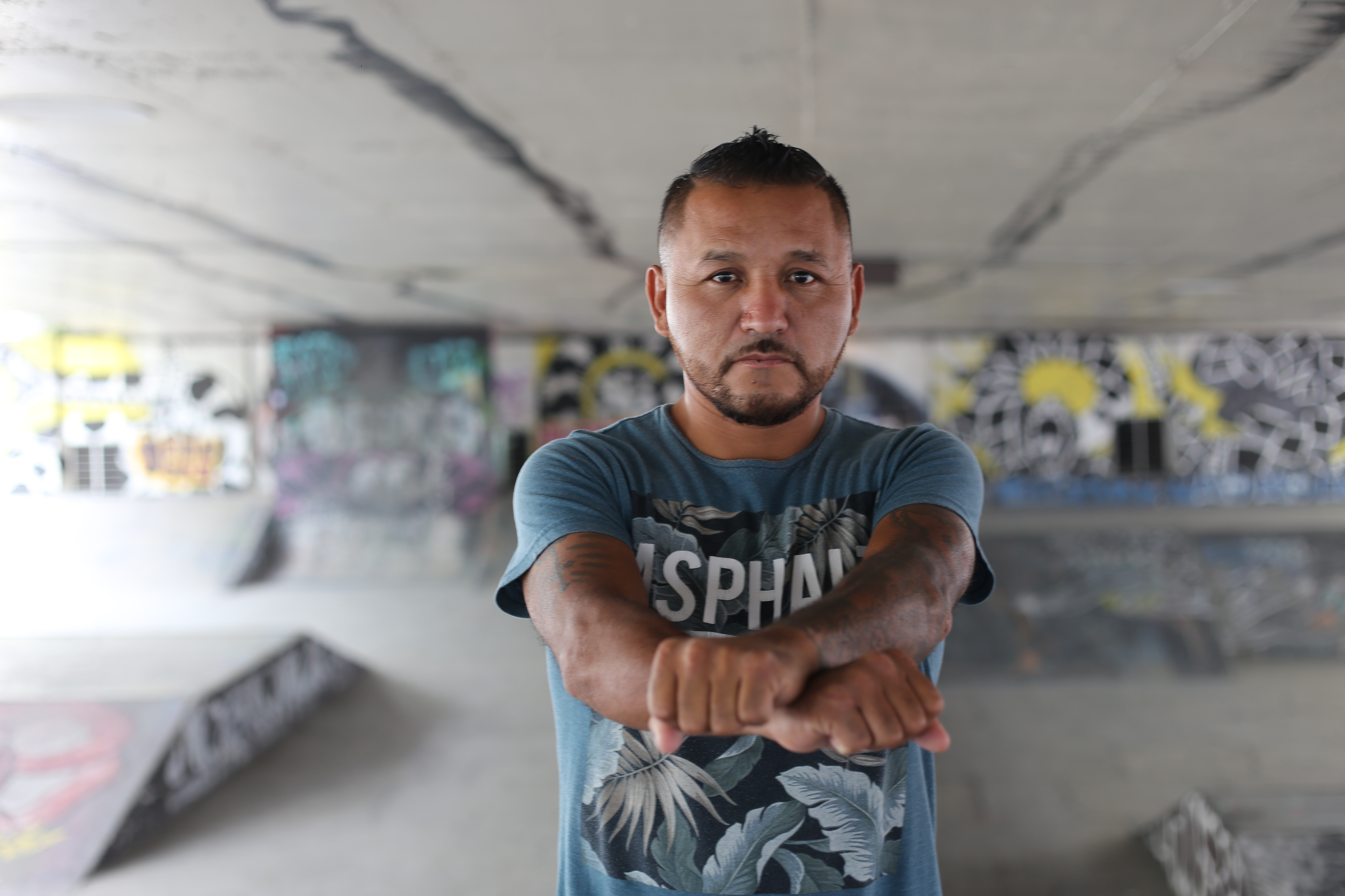 Mijis